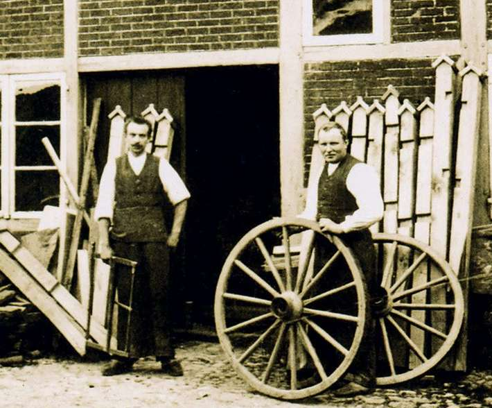 Stellmacherei von Johann Jacob Heinrich Bahr in Bramfeld, Keimzelle des Unternehmens Max Bahr.